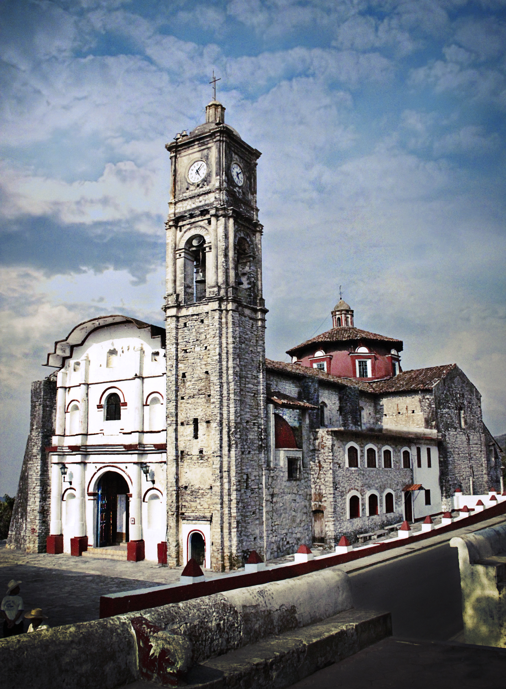 Iglesia de San Martín Tuzamapan de Galena Puebla, Fiesta dedicada al Padre Jesús el 6 de agosto y a San Martín el día 11 de Noviembre mostrando un espectáculo de globos aerostaticos de papel de china.